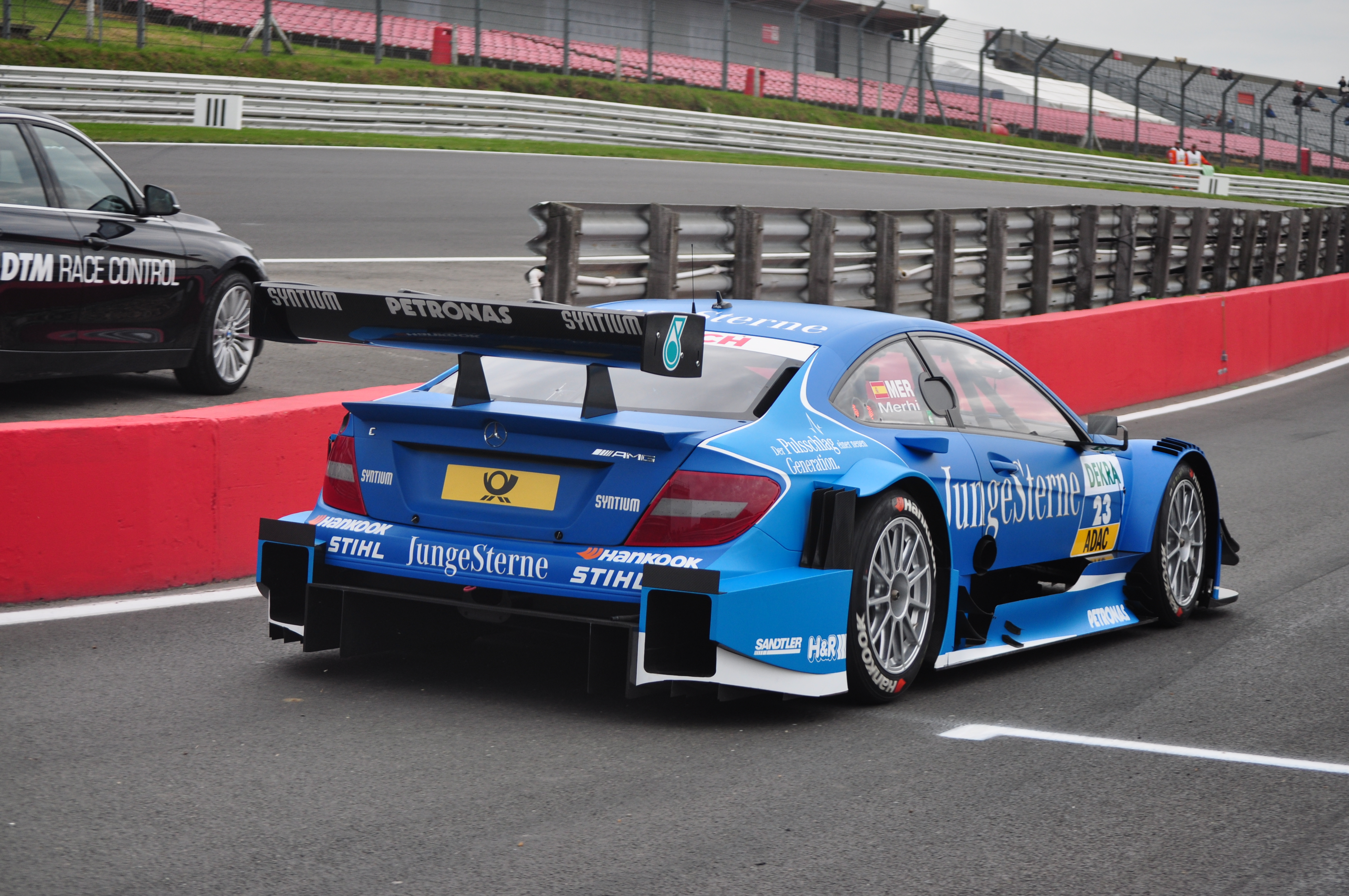 DTM